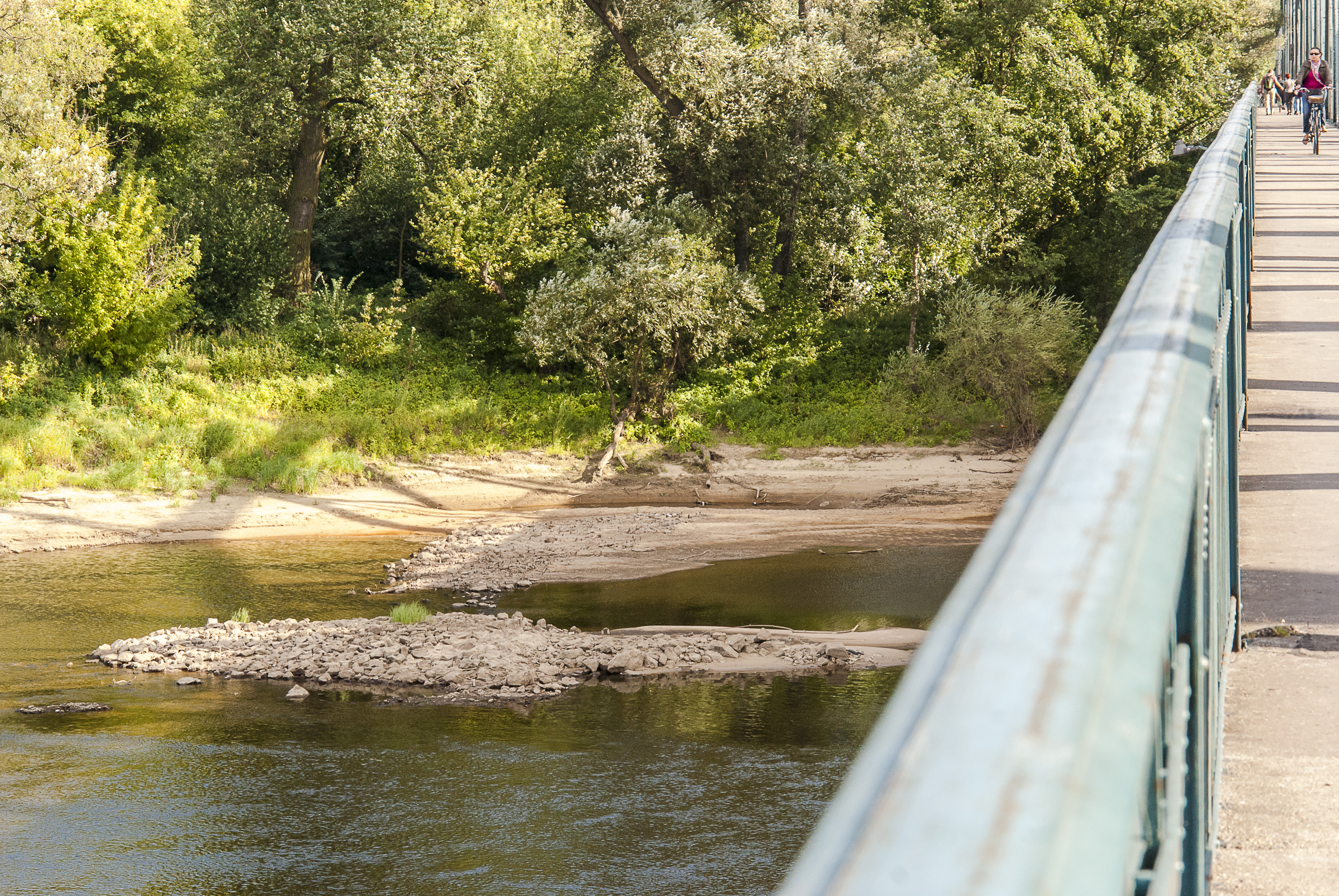 Most Piłsudskiego w Toruniu